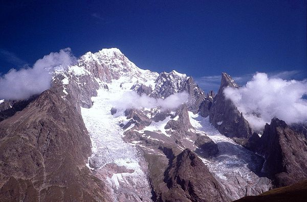 Mont Blanc, gezien vanaf de Italiaanse kant